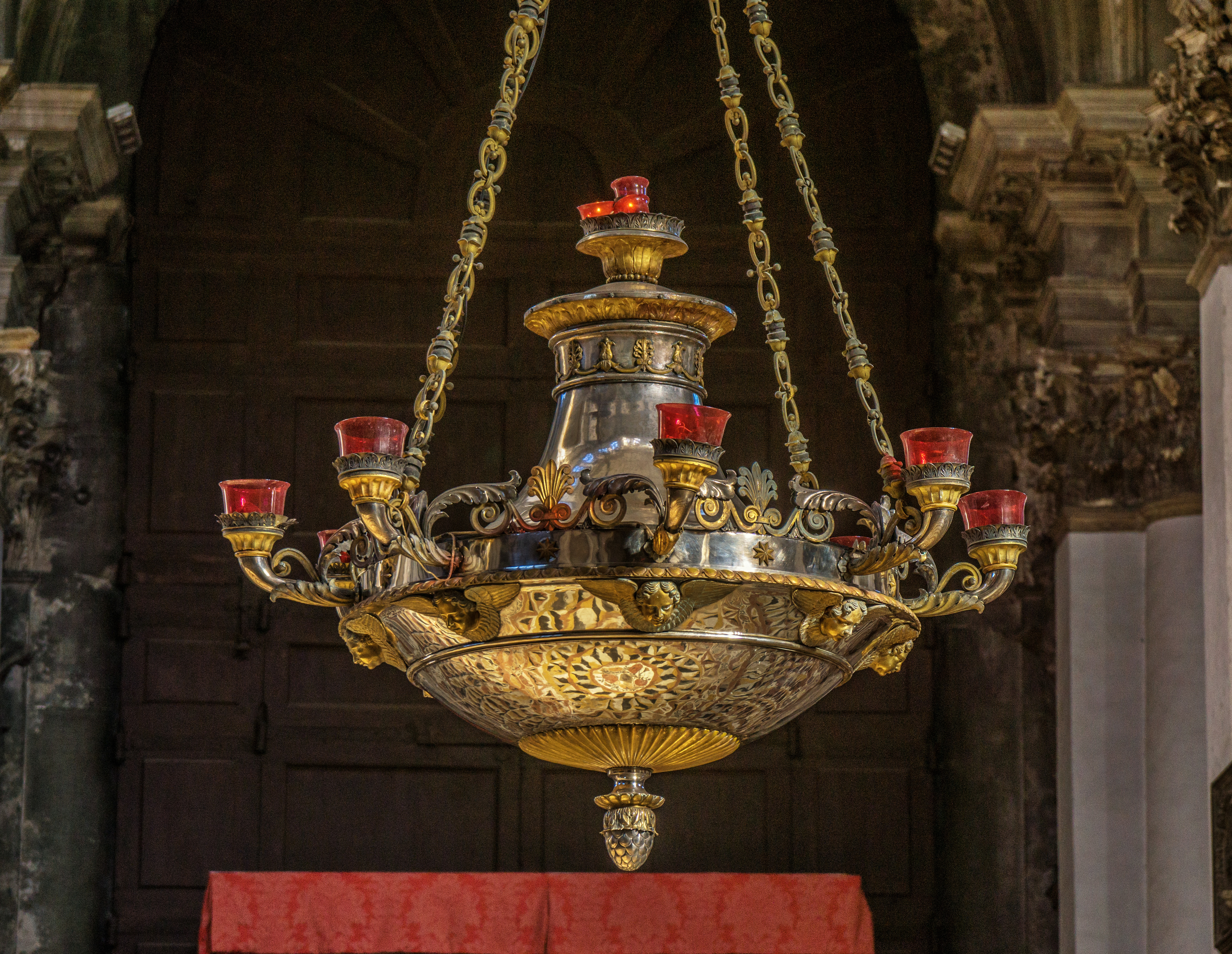 Hanging Lantern